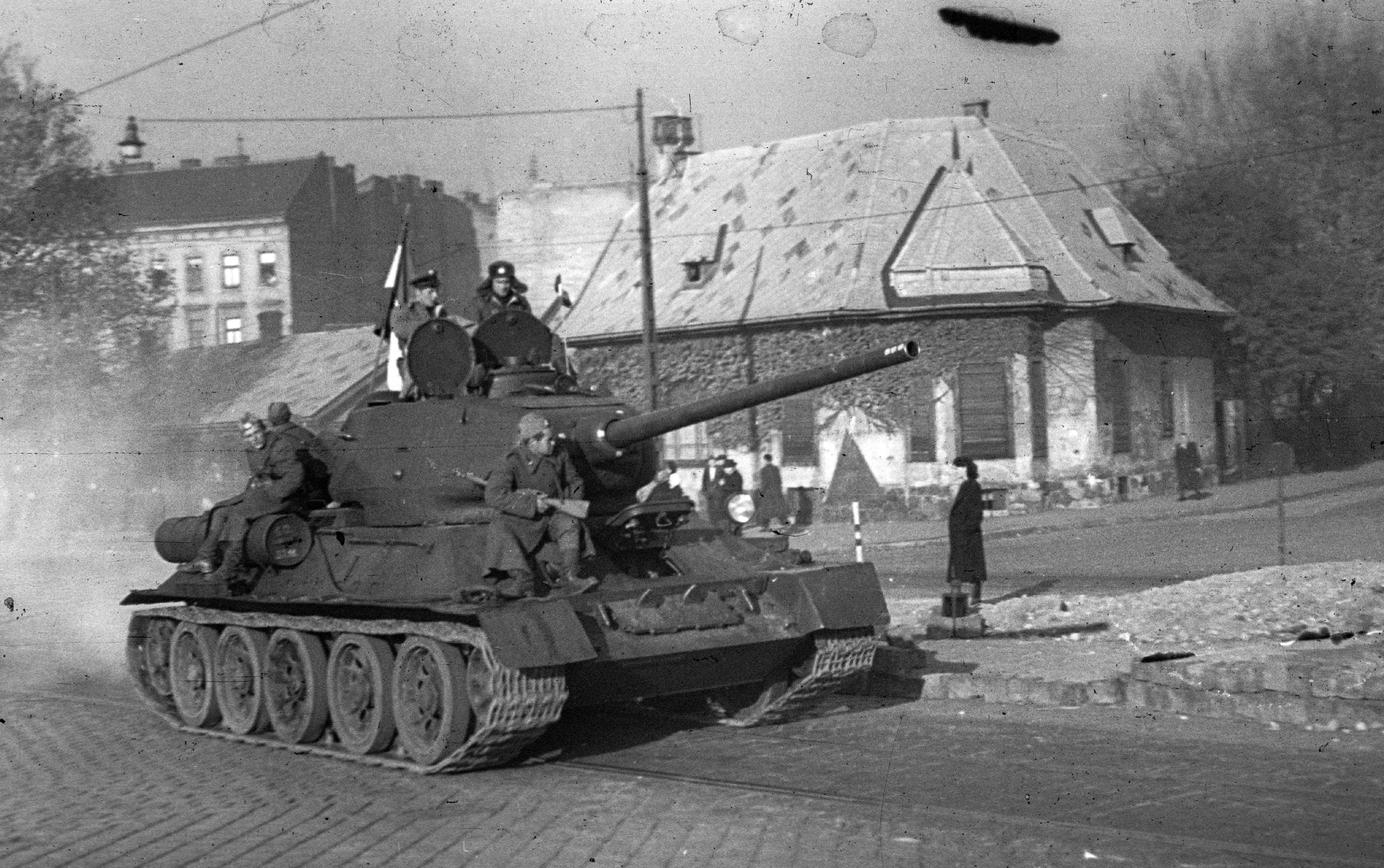 Haller utca (Hámán Kató út) a Balázs Béla utca torkolatánál, háttérben a Telepy utca házai. Location: Hungary, Budapest IX. Tags: tank, revolution, flag, Soviet brand, Budapest Title: Haller utca (Hámán Kató út) a Balázs Béla utca torkolatánál, háttérben a Telepy utca házai.